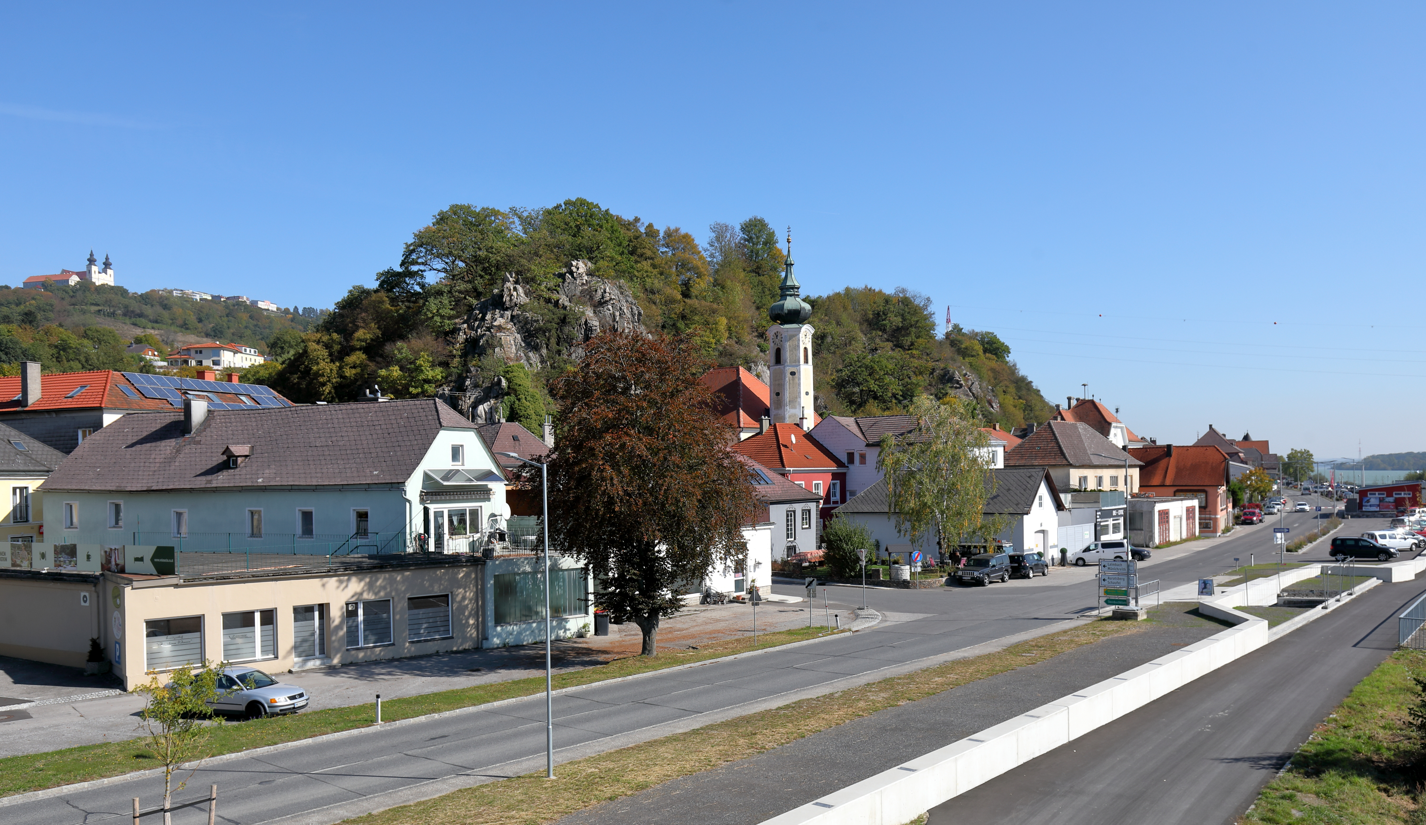 Westsüdwestansicht des Ortskernes der niederösterreichischen Marktgemeinde Marbach an der Donau. Links oben im Hintergrund die Gemeinde Maria Taferl sowie rechts unten im Vordergrund die Donauhochwasserschutz-Verbauung, die ab 2016 in einer zweijährigen Bauphase auf einer Länge von 3,6 km erfolgte.